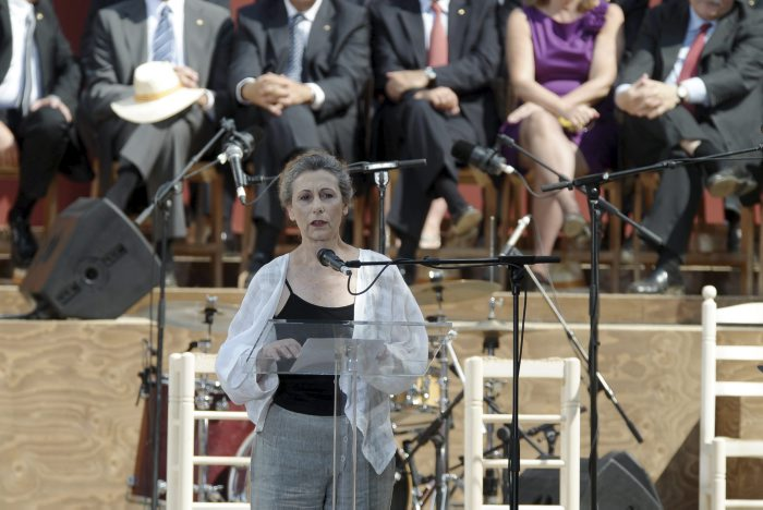 Carme Sansa a l'acte institucional de la Diada Nacional de Catalunya de 2012